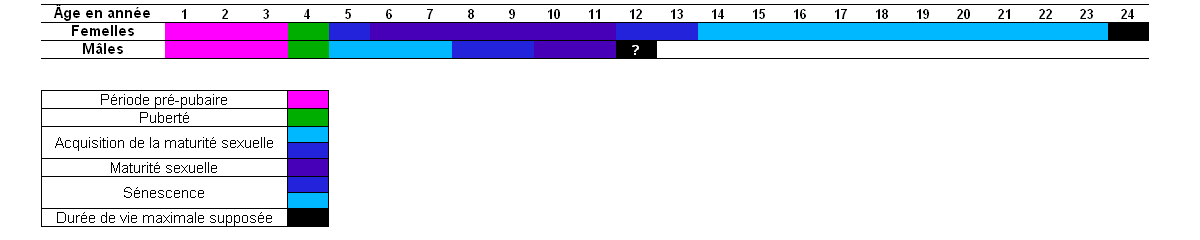 Figure qui représente l'activité reproductrice chez les otaries subantarctique mâles et femelles (Arctocephalus tropicalis) en fonction de l'âge. L'âge maximal constaté chez les deux sexes est également indiquée. Cette figure est inspirée des articles suivant : Reproduction in the male subantarctic fur seal Arctocephalus tropicalis. Bester, M.N., Journal of Zoology, 222 (2), 177-185, 1990. Reproduction in the female subantarctic fur seal, Arctocephalus tropicalis. Bester, M. N., Marine Mammal Science, 11 (3), 362-375, 1995.